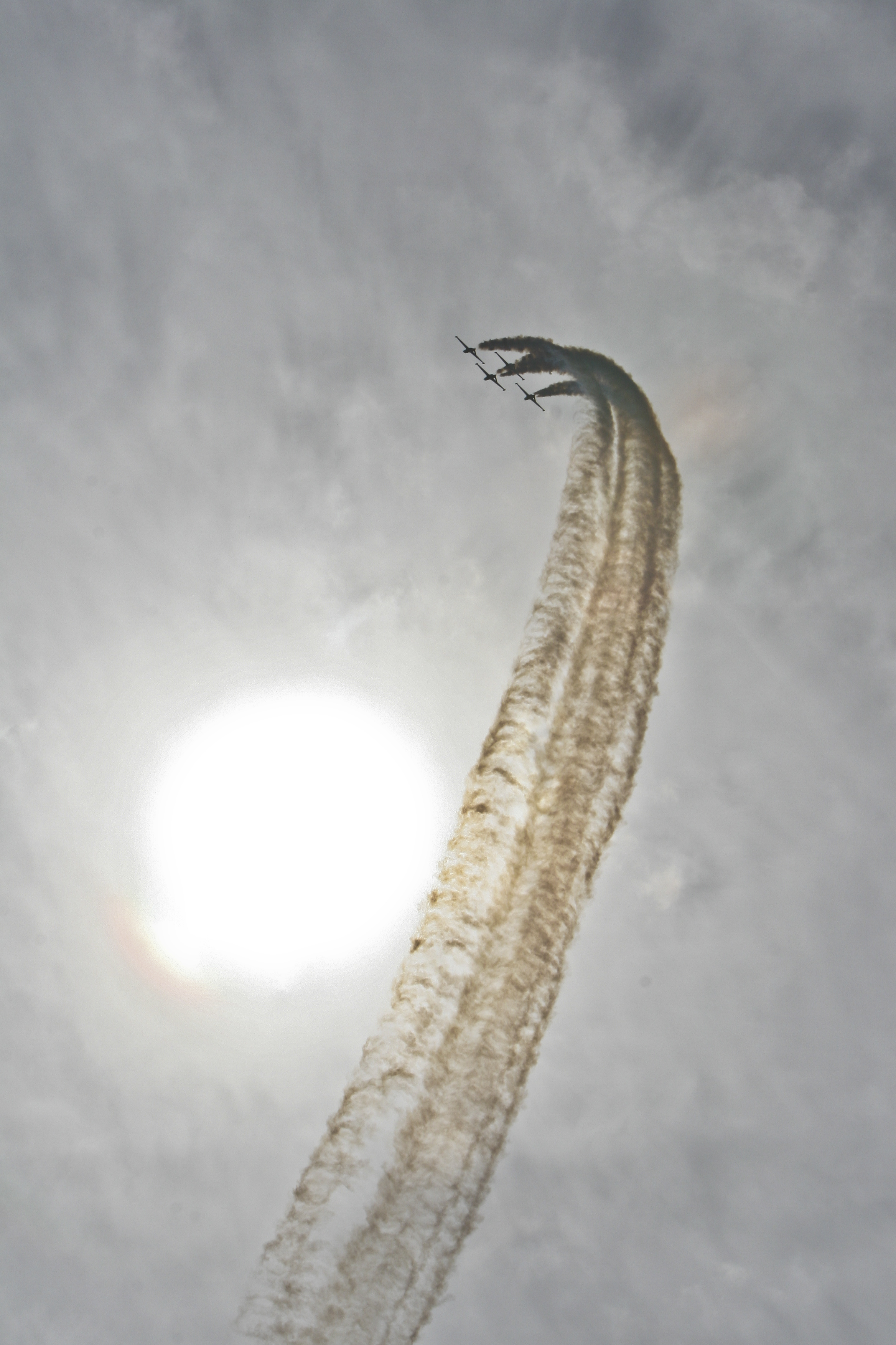 מפגן חיל האוויר יום העצמאות ה-60 למדינת ישראל